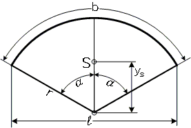 Schwerpunkt eines Kreisausschnitts für Flächenschwerpunkte